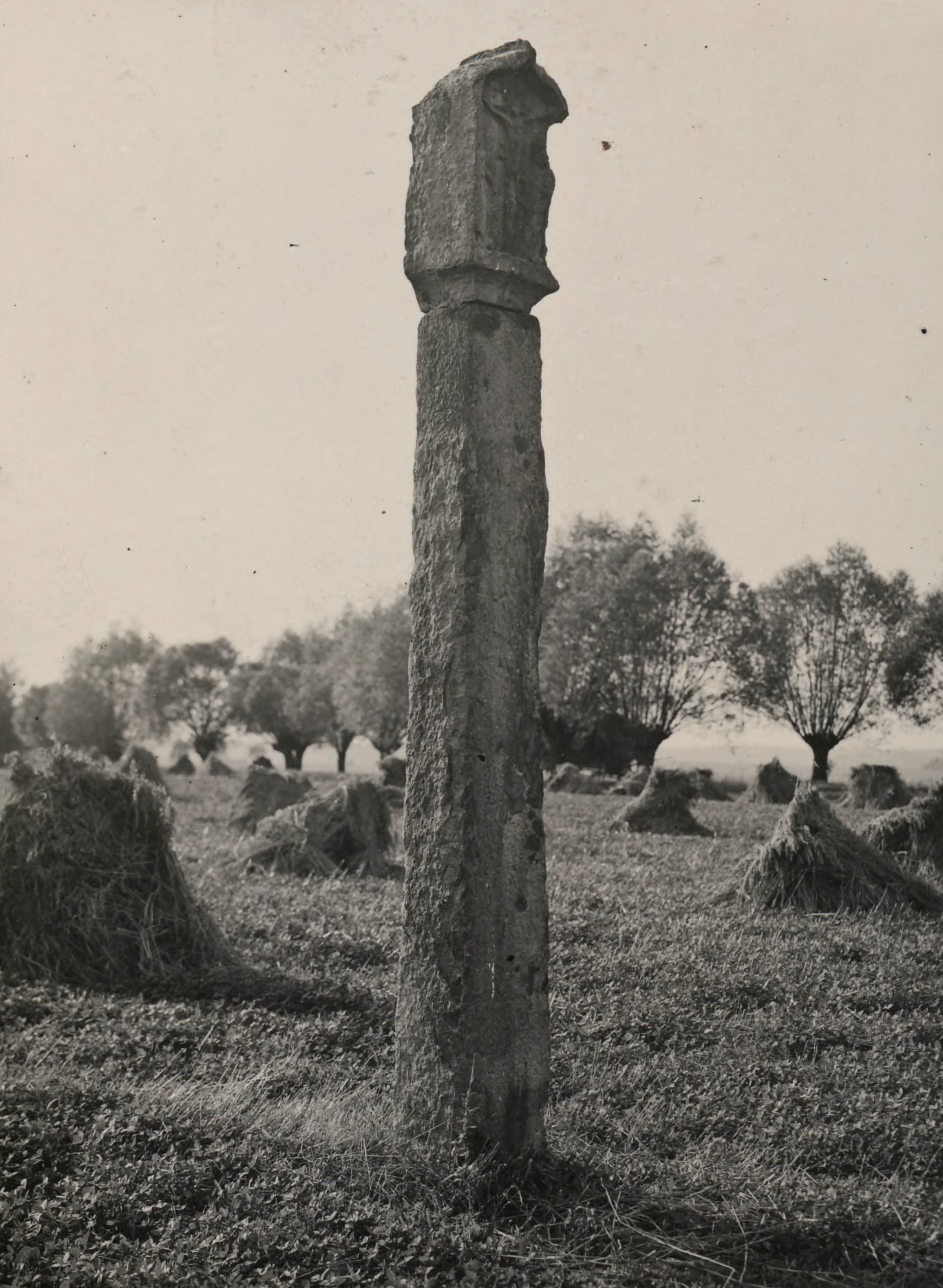 Feldsäule in Nowag Kreiss Neisse, Oberschlesien